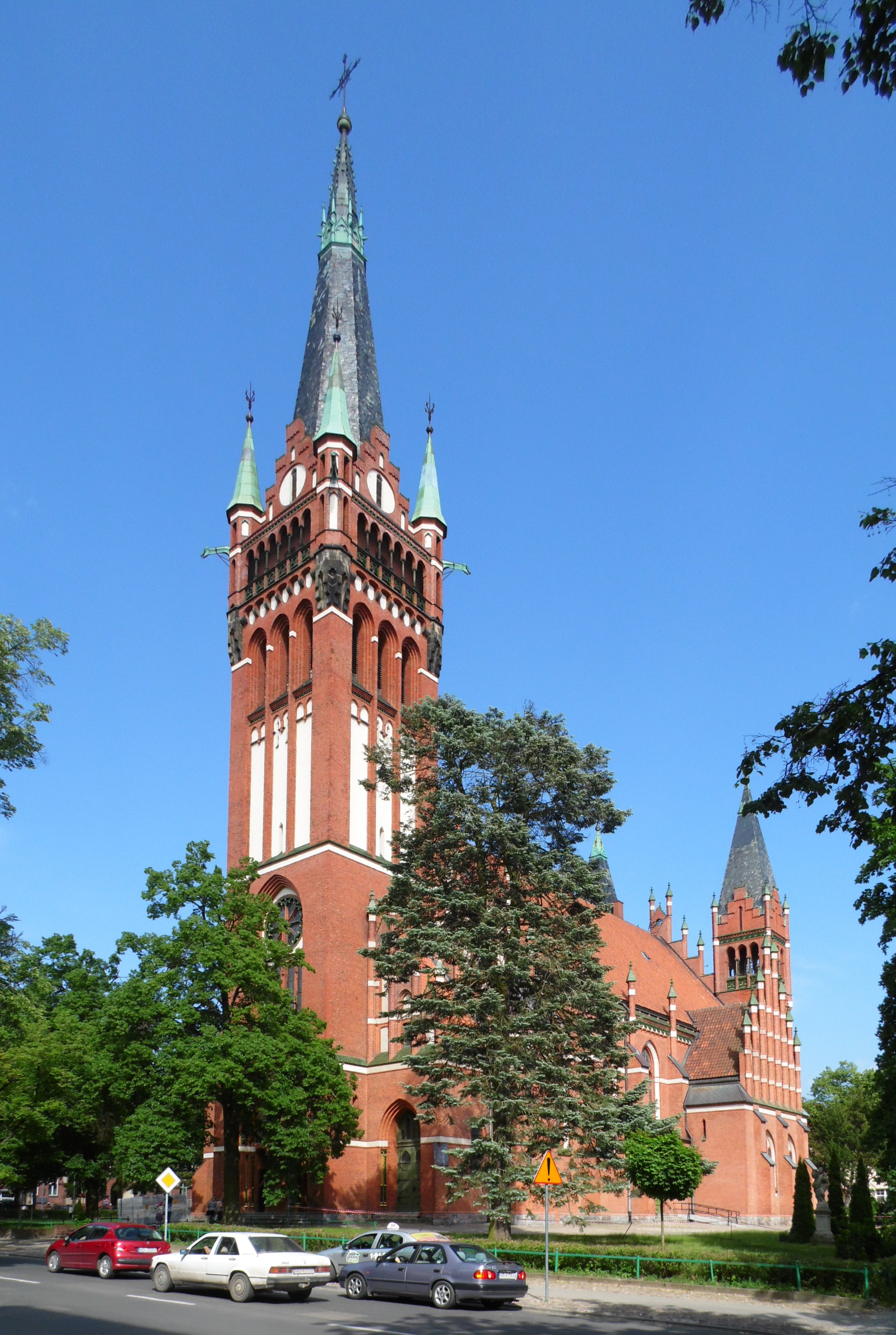 KOSCIÓŁ PRZY UL. KOPERNIKA.